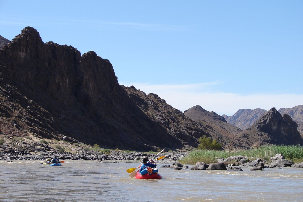 Orange River rafting